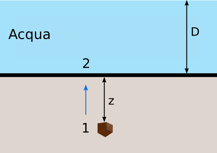 Filtrazione di acqua verso l'alto in un terreno saturo.